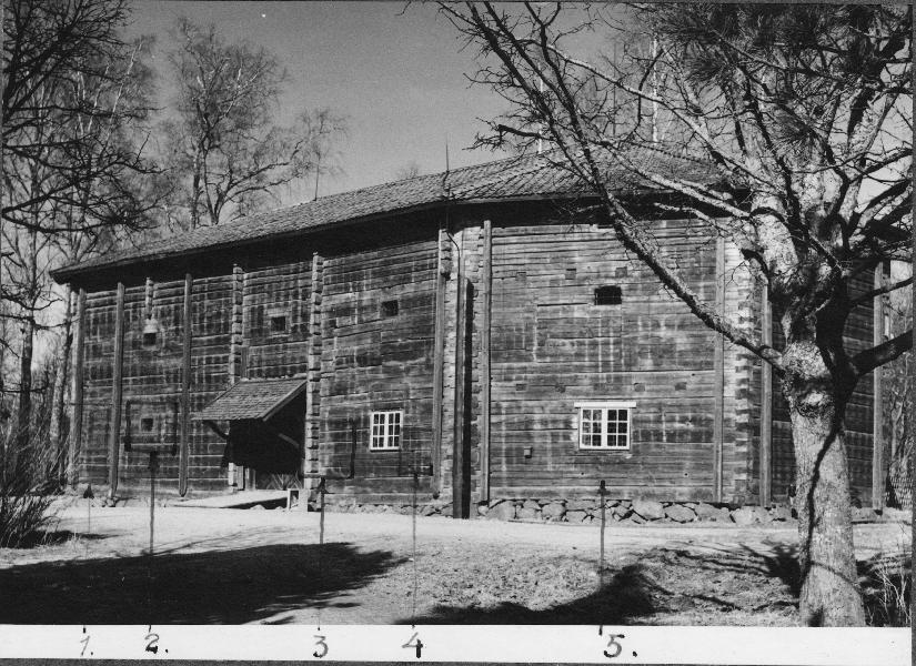 Kyrkans ena långsida, troligen den ursprungliga södra. Siffrorna i nederkant hänvisar till bildbeteckning 3828-20.TIF t o m 24. Kategori: (01) ExteriörerKyrkans ena långsida, troligen den ursprungliga södra. Siffrorna i nederkant hänvisar till bildbeteckning 3828-20.TIF t o m 24.